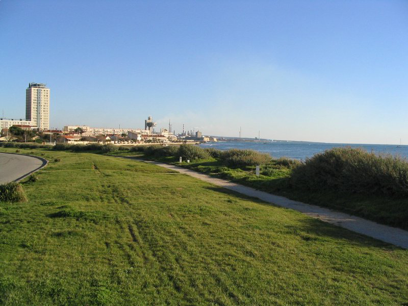 Port-de-bouc quartier des aigues douces Vue du quartier de la Leque et de la Caravelle